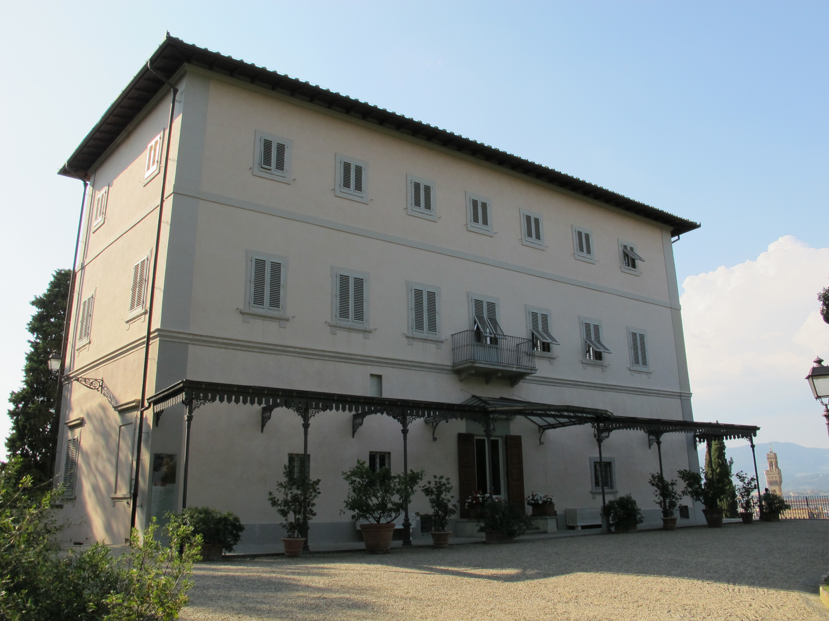 Villa bardini